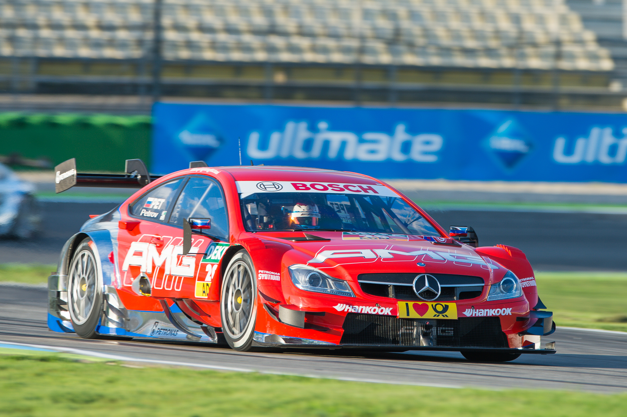 DTM,Deutsche Tourenwagen Masters,Hockenheimring,Mercedes AMG C-Coupe,Motorsport,Mücke Motorsport,Vitaly Petrov